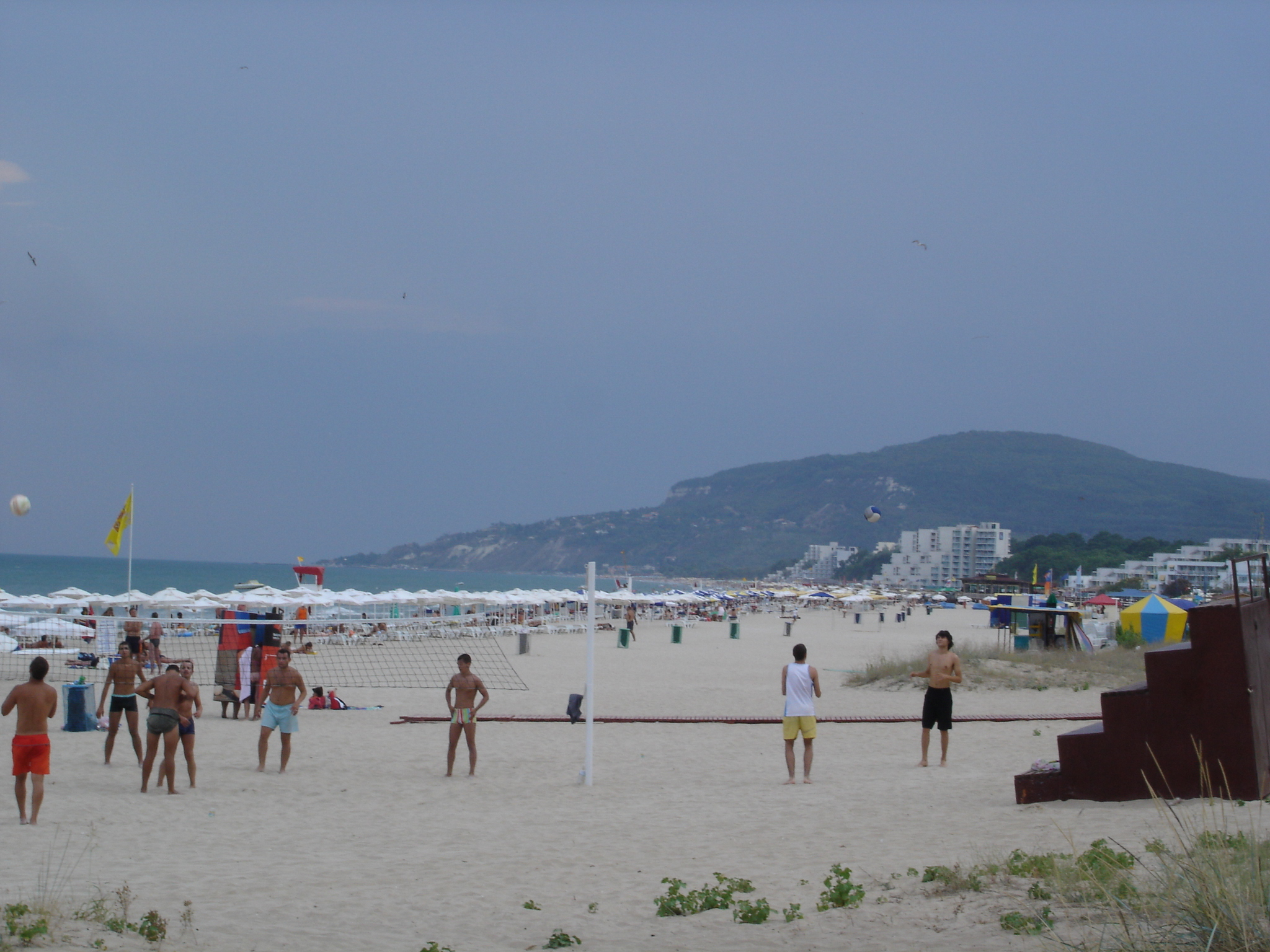 Beach in Albena, Bulgaria